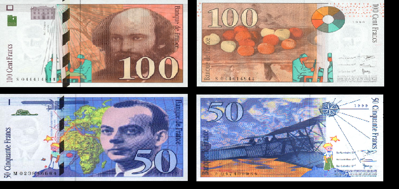 50 ve 100 frank banknotları